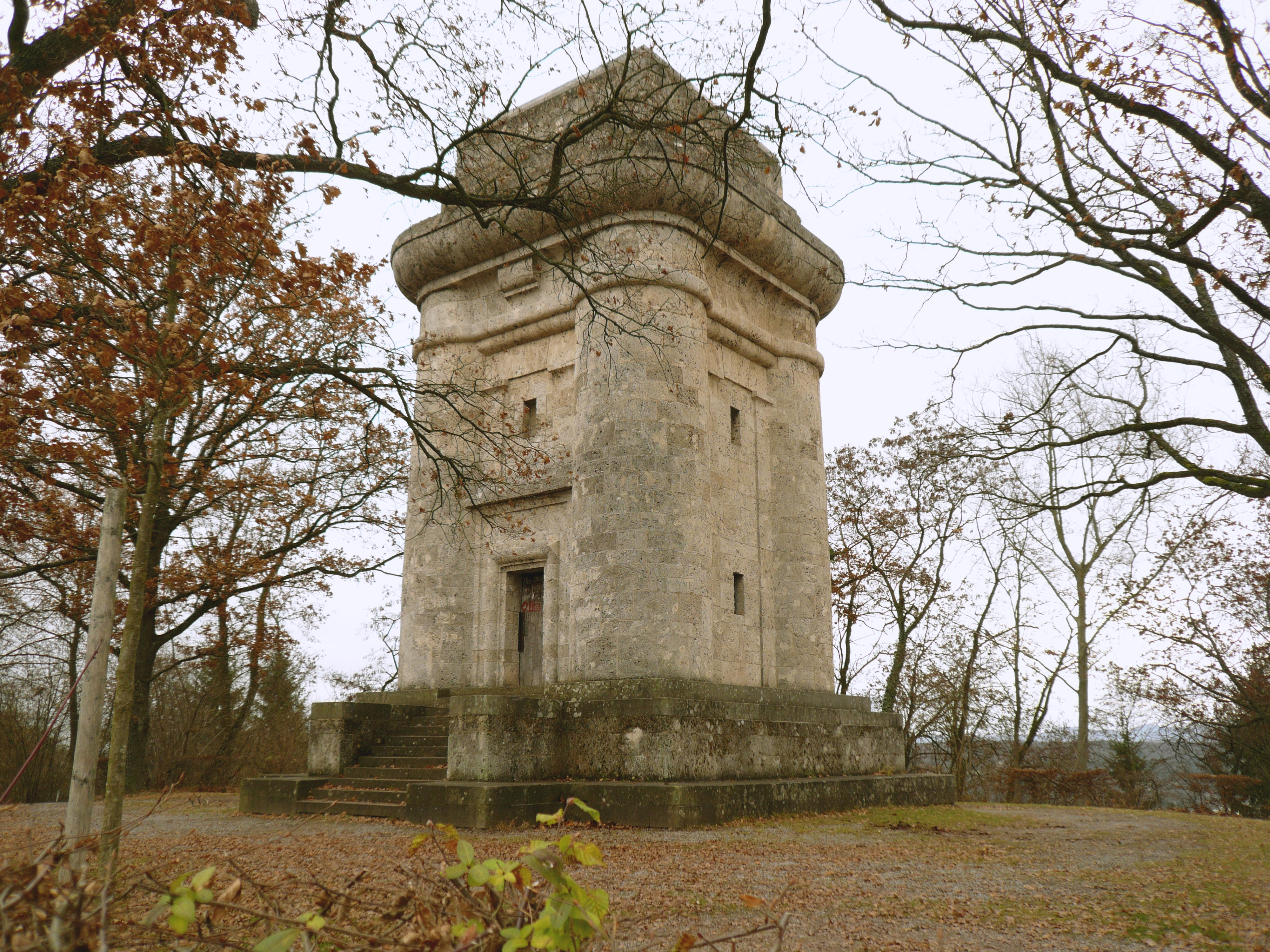 Bismarckturm in Tuebingen.